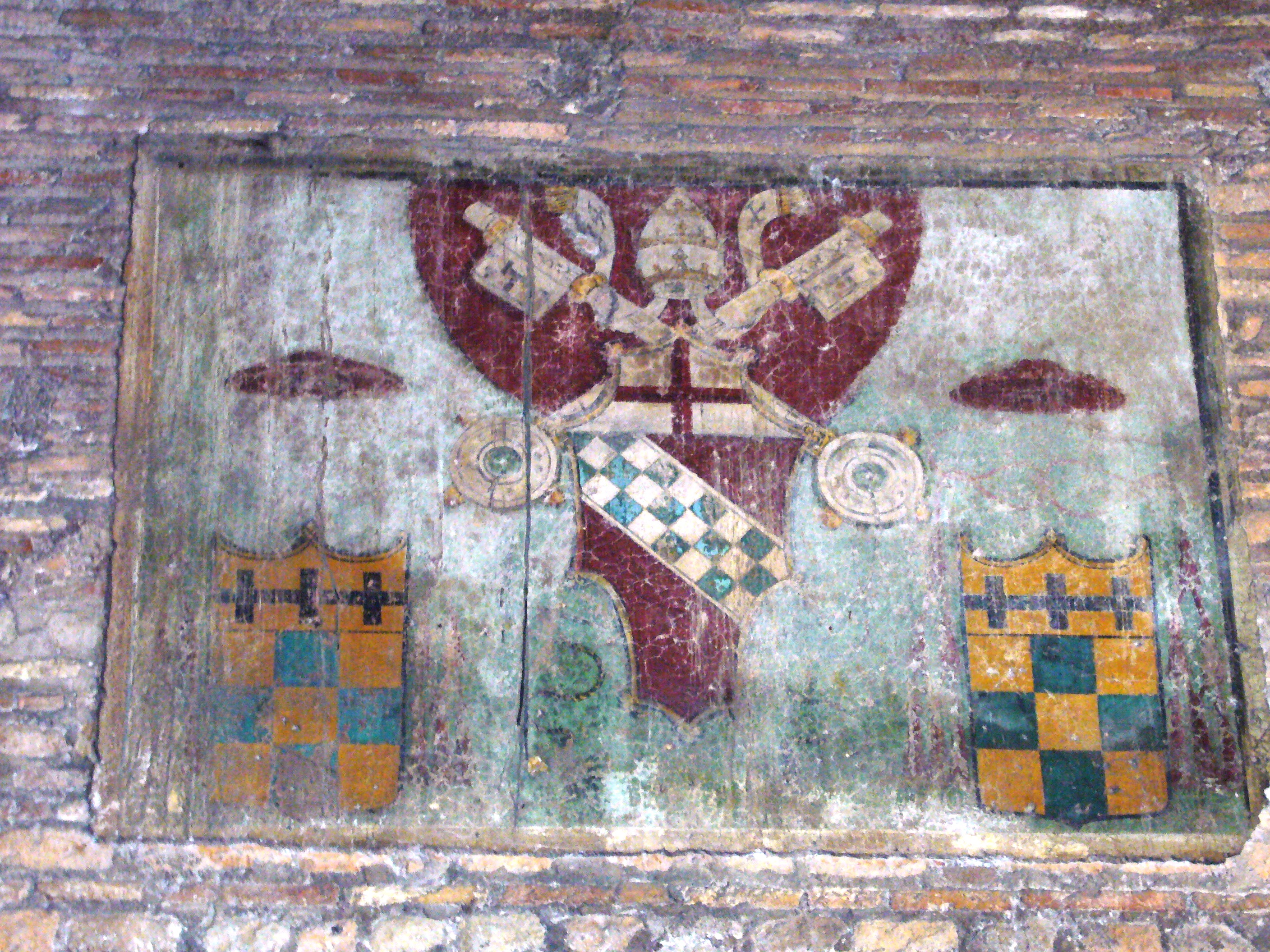 Santa Balbina a Roma: stemma di Innocenzo VIII (titolare dal 1473 al 1474) nel portico. Foto by Lalupa.